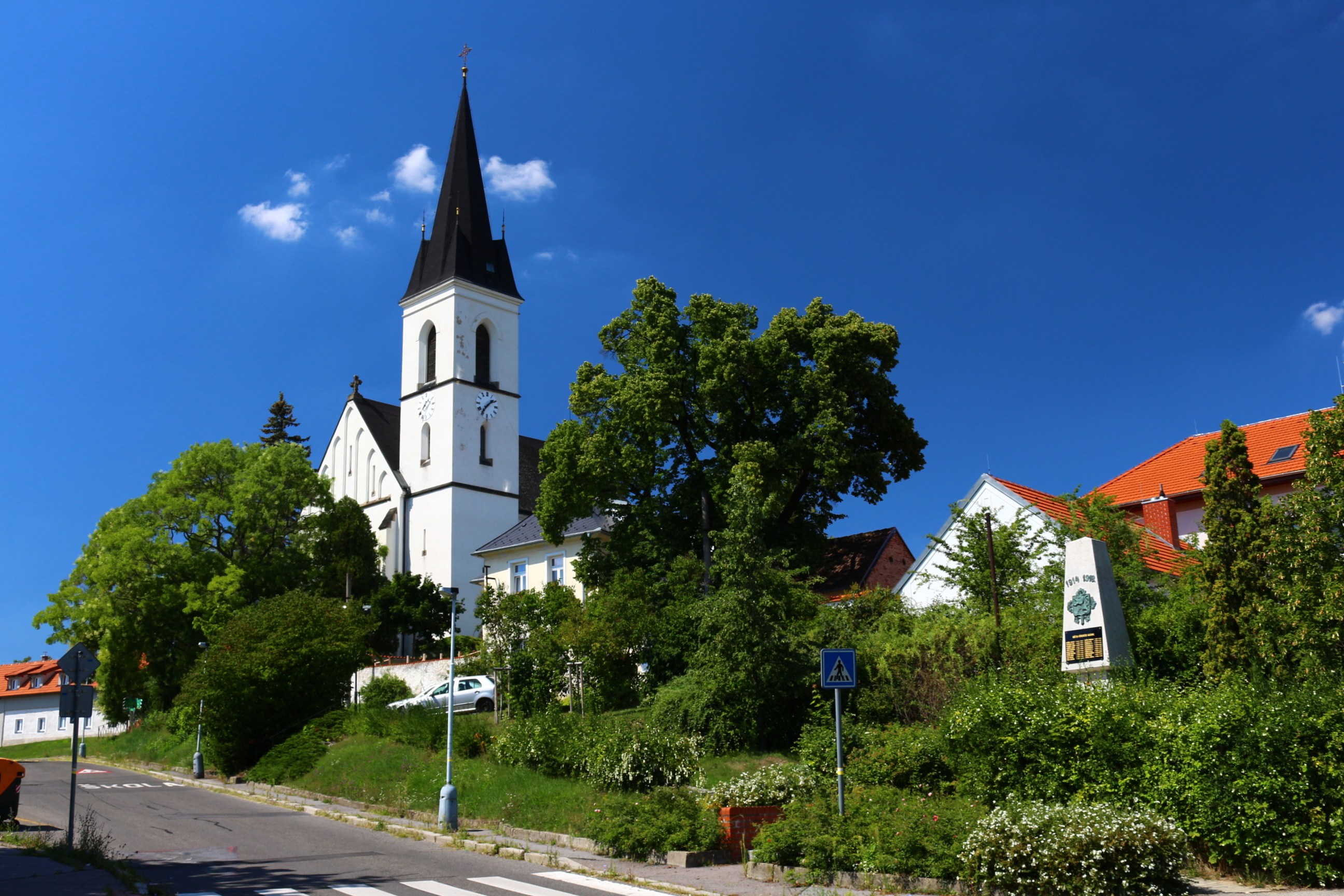 Praha-Stodůlky, kostel sv. Jakuba